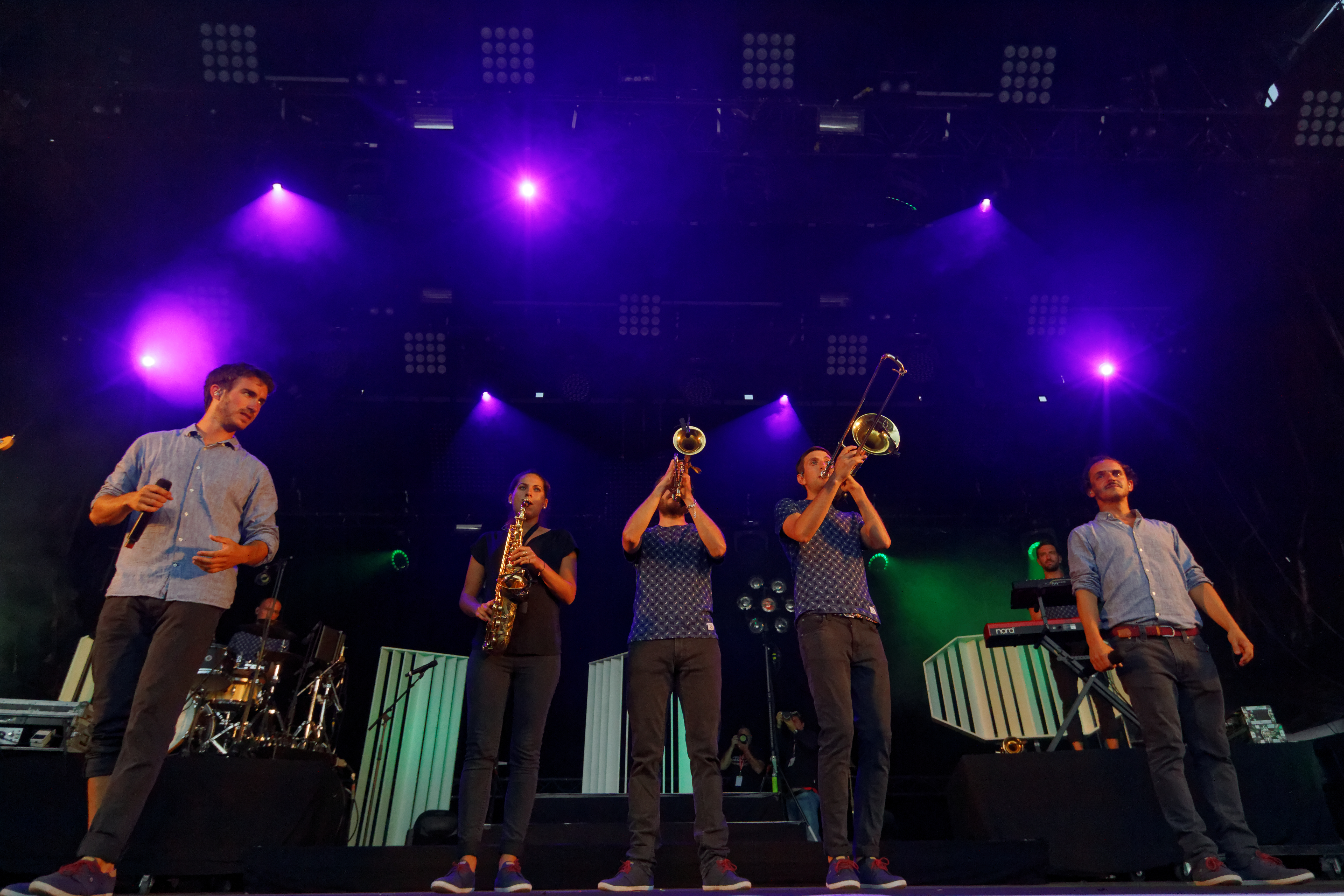 Boulevard des Airs en concert sur la scène Landaoudec lors du festival du Bout du Monde 2016 à Crozon dans le Finistère (France).